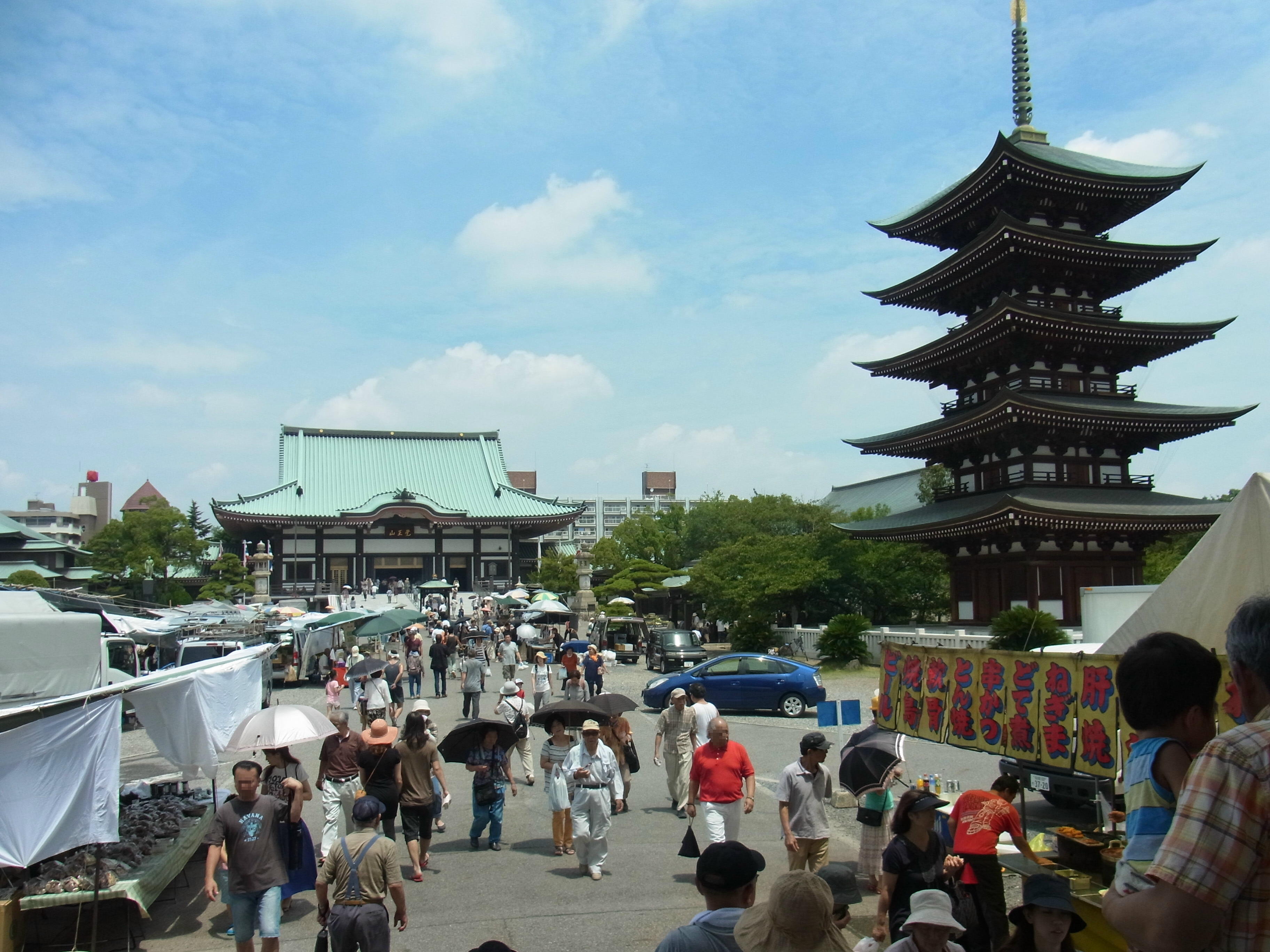 名古屋市、覚王山日泰寺